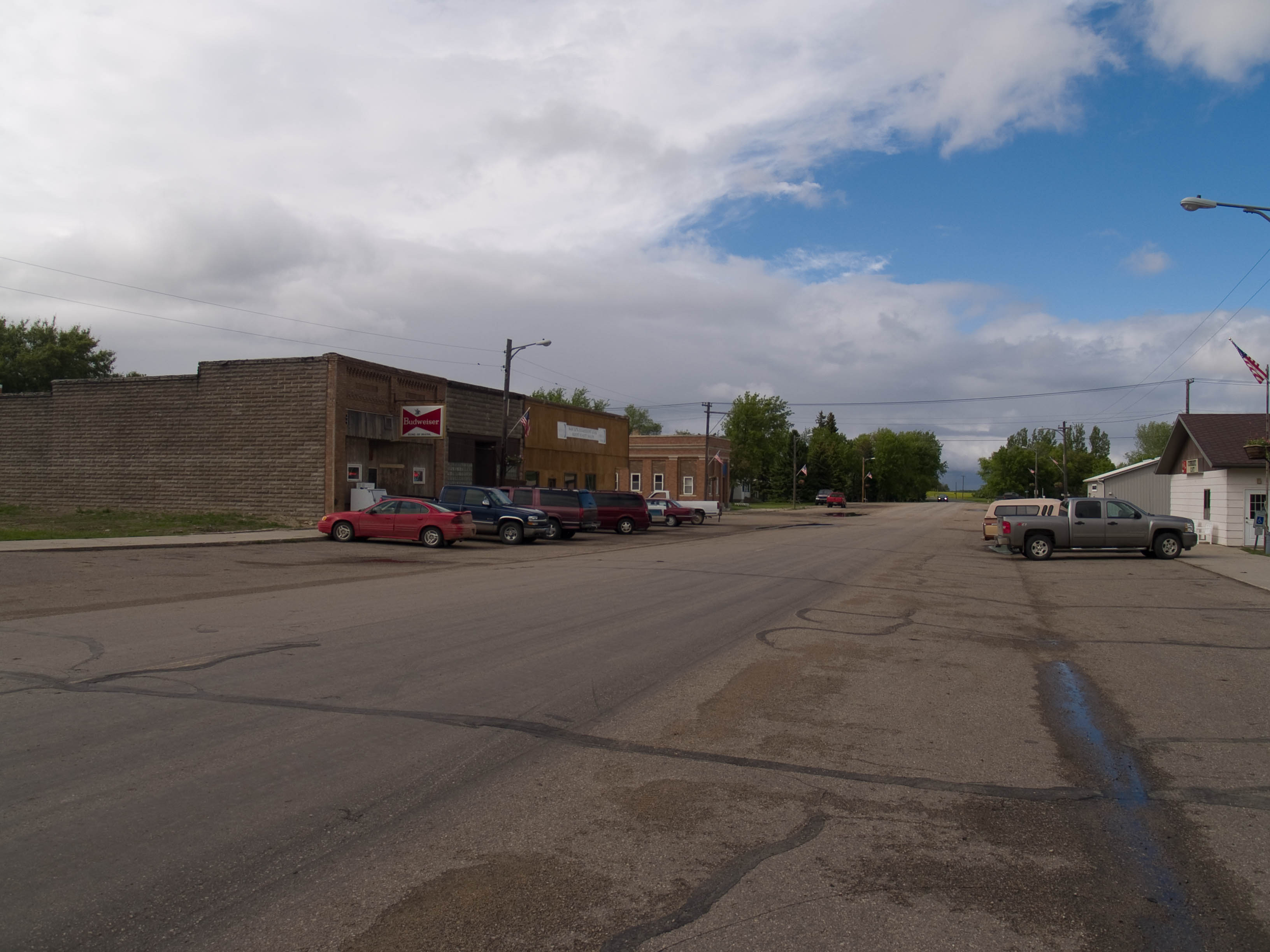 Kensal, North Dakota